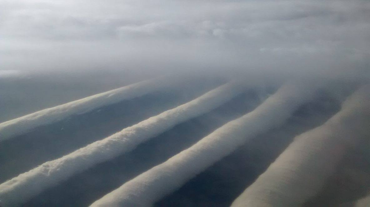 Avistaje de fenómeno Morning Glory desde el avión